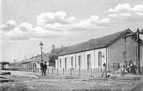 Passengers waiting for the train in Belgrano R train station of Buenos Aires and Campana Railway.